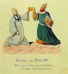 Irene und Philipp Herzog in Schwaben und Toskana Erwählter Römischer Kaiser